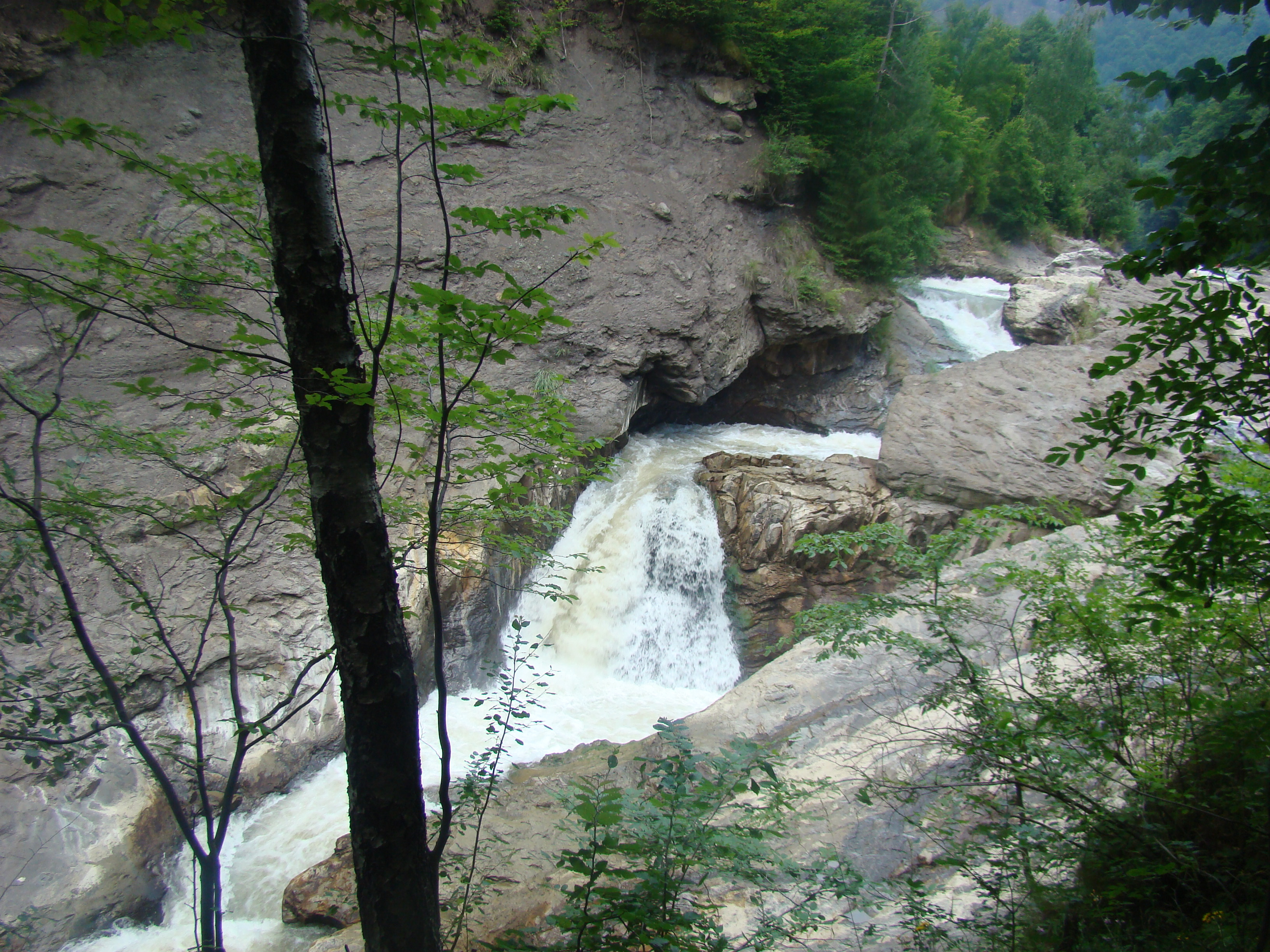 Cascada Putnei, județul Vrancea